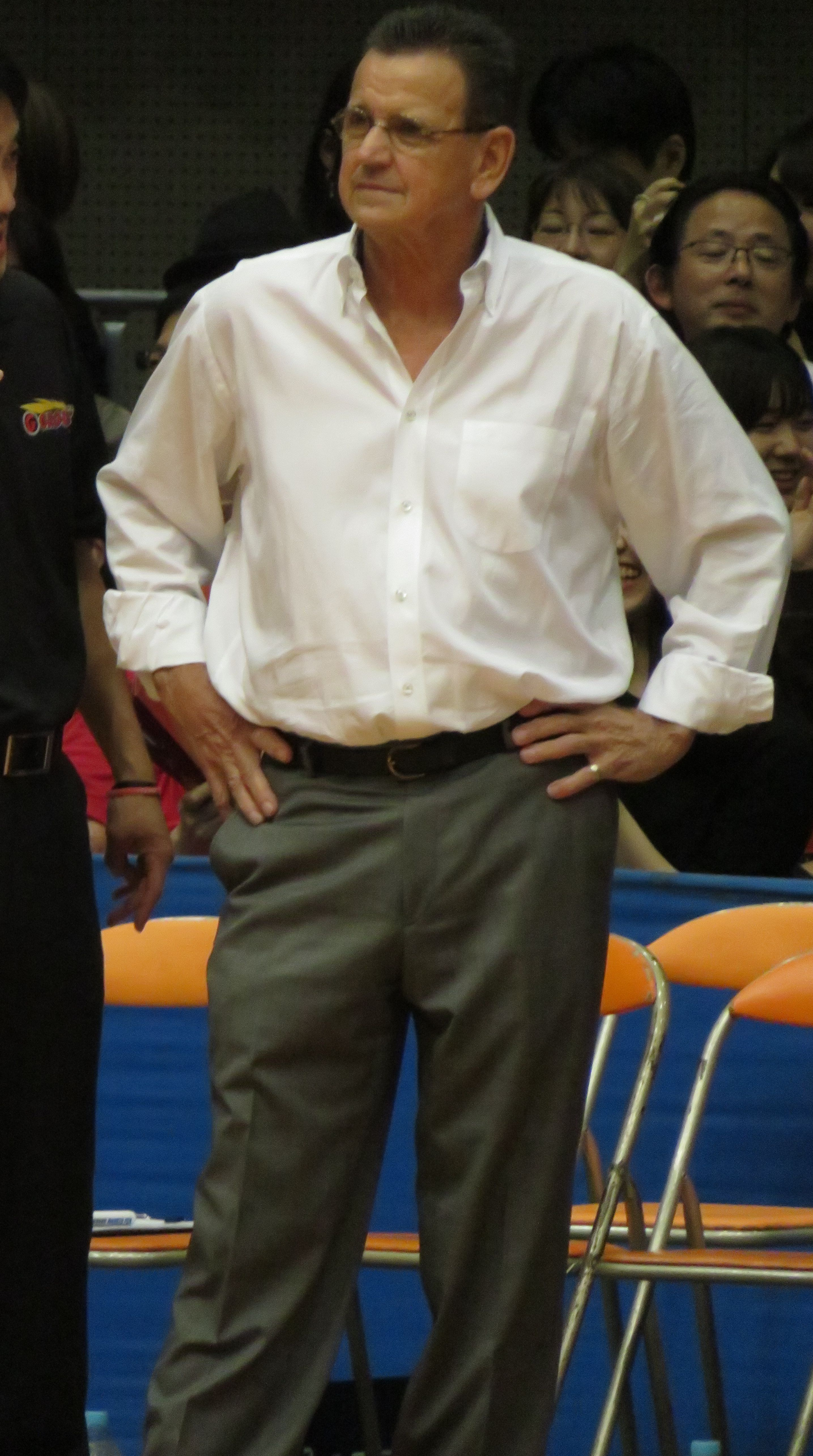 2018年10月18日撮影 2018-19 B1 第3節 横浜-富山 横浜文化体育館にて